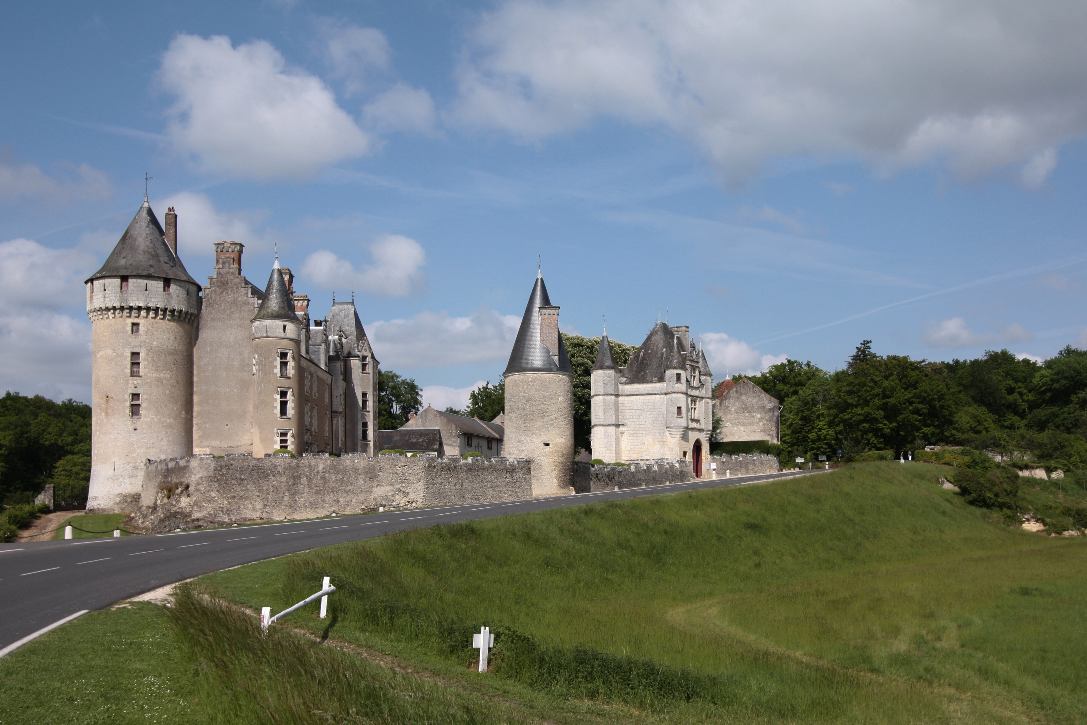 Schloss Montpoupon im Département Indre-et-Loire/Frankreich - Schlossanlage von der Straße aus gesehen.